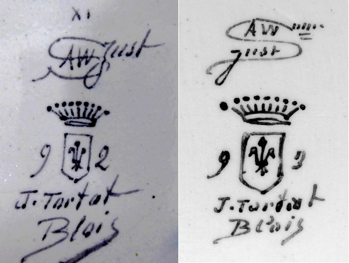 marques utilisées par A.W. Just à partir de 1891